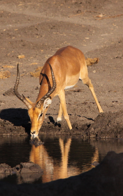 Impala, Aepyceros melampus in Mapungubwe - drinking at sunset